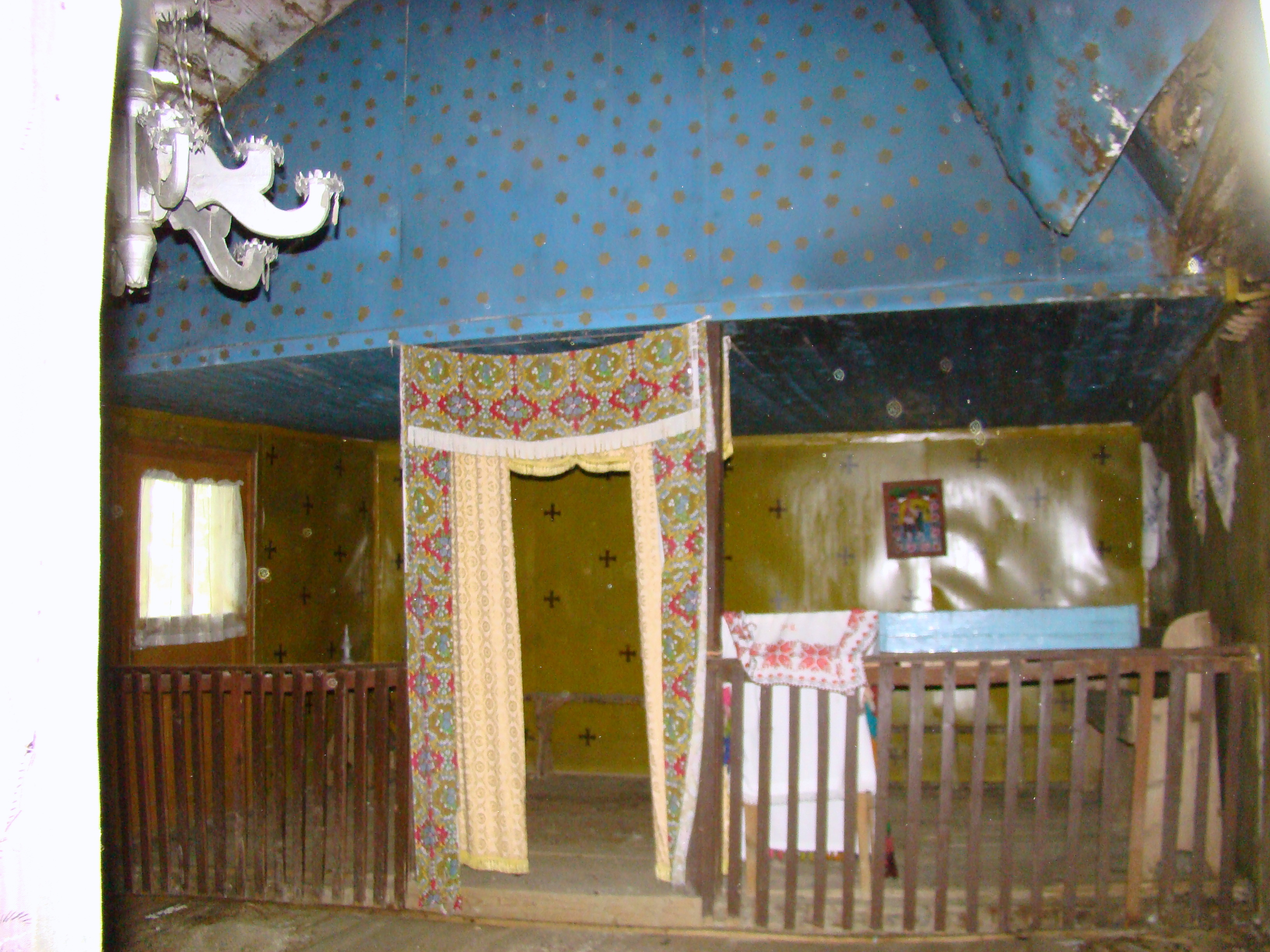 Biserica de lemn "Sf. Ioan Botezătorul" , sat COMLOD; comuna MILAŞ